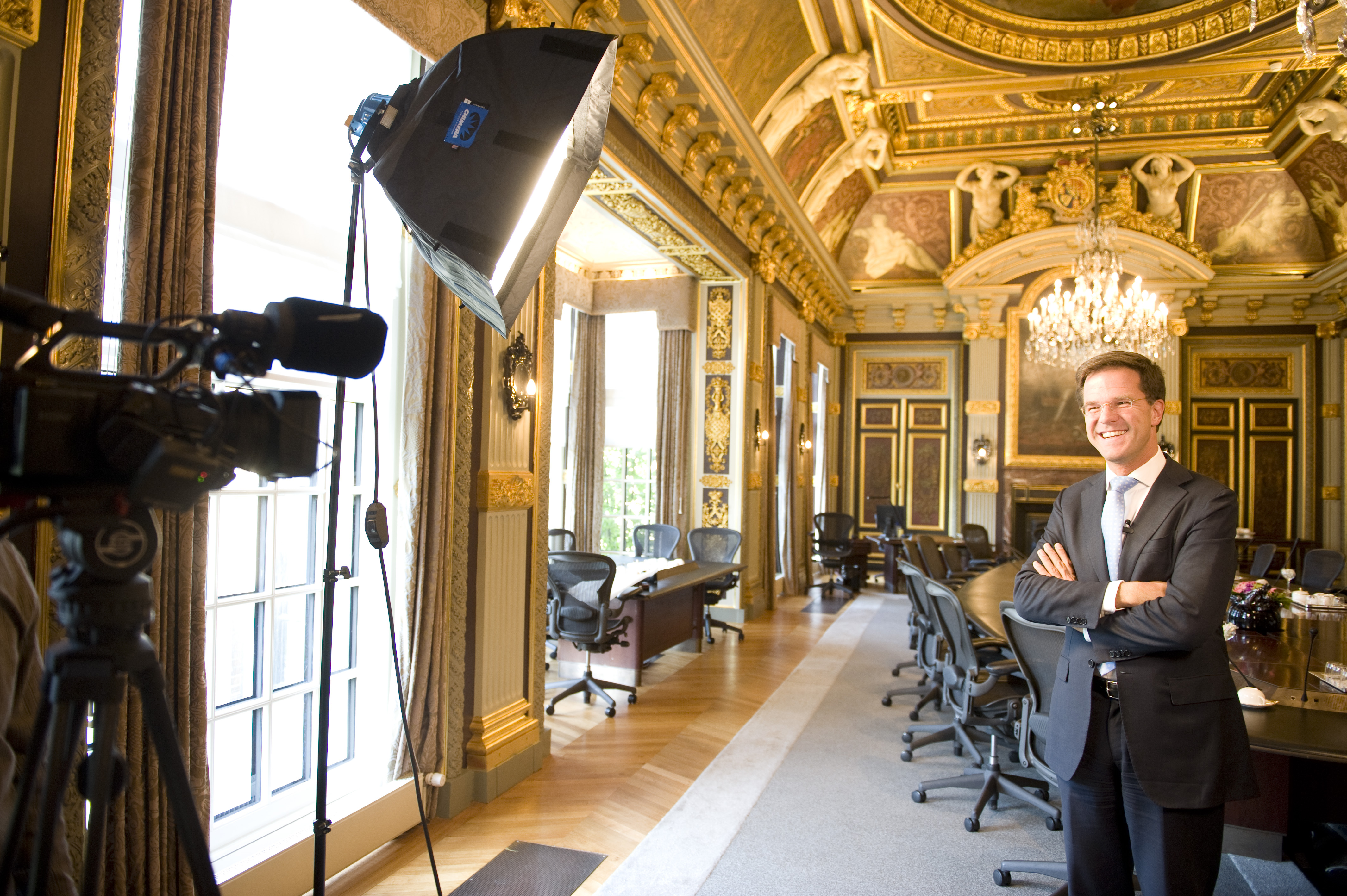 Minister-president Rutte beantwoordt in een video vragen van Twitteraars vanuit de Trêveszaal. Bekijk hier de video